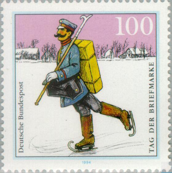 Tag der Briefmarke Ausgabepreis: 100 Pfennig Michel-Katalog-Nr: 1764